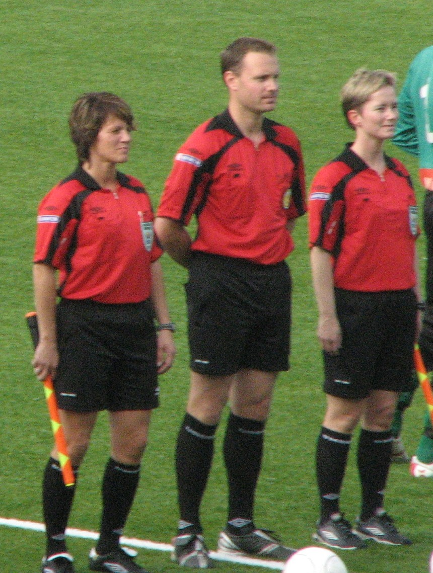 Ken Henry Johnsen, Hege Lanes Steinlund (t.v), Vibeké Larsen (t.h) dømte Bodø/Glimt-Sogndal i 2007Speaker.no